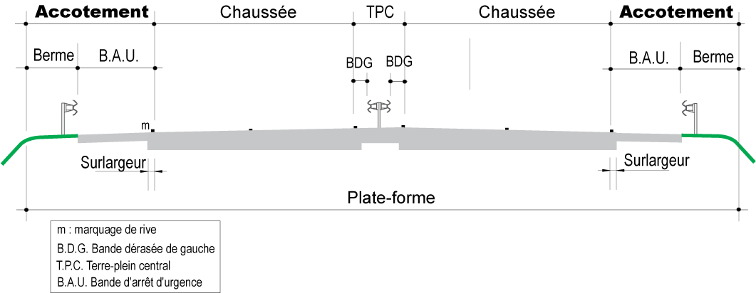 Terminologie routière – Accotement, sur une chaussée à 2x2 voies ou autoroute.